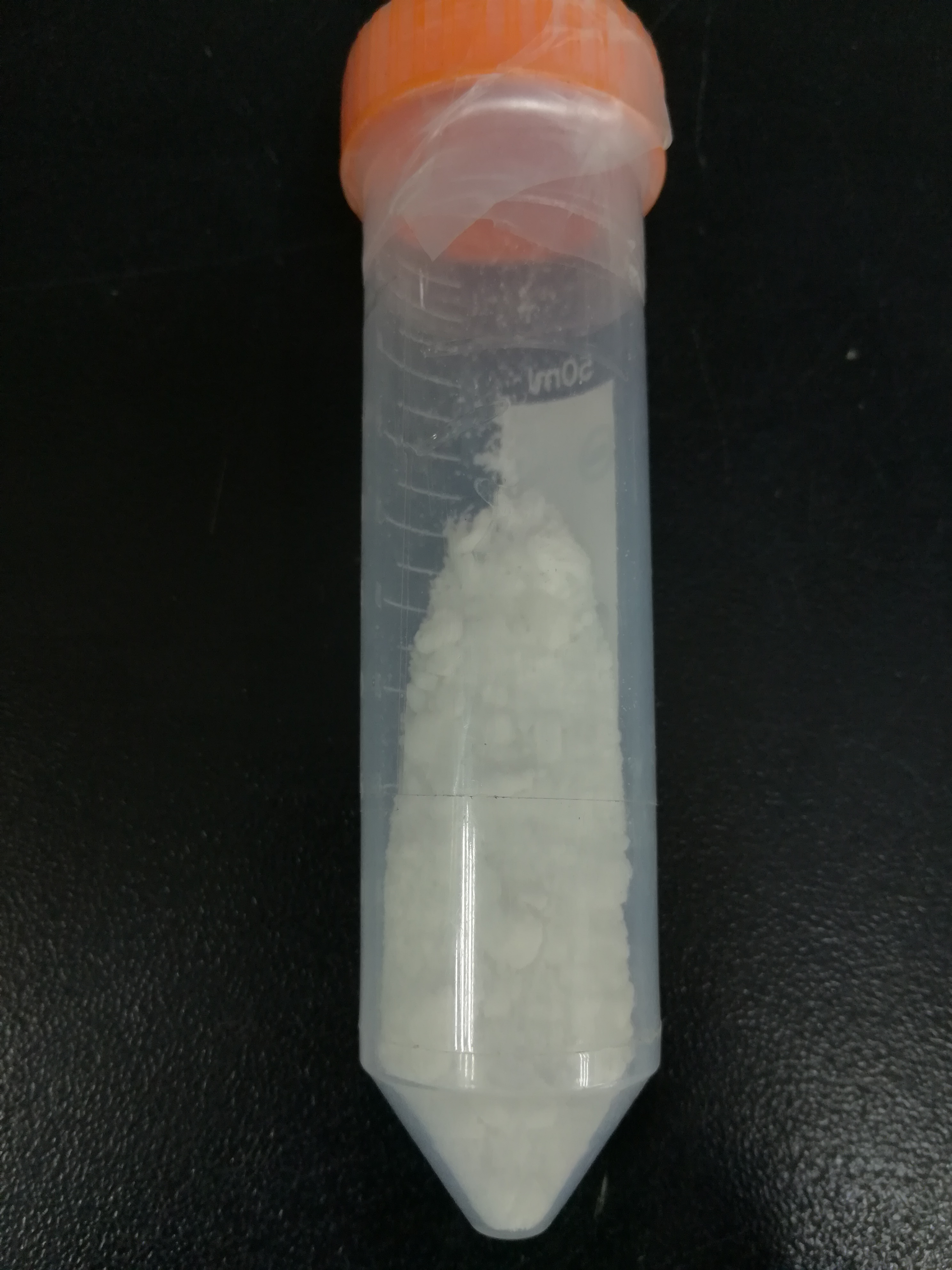 乙酸钇（又名醋酸钇）